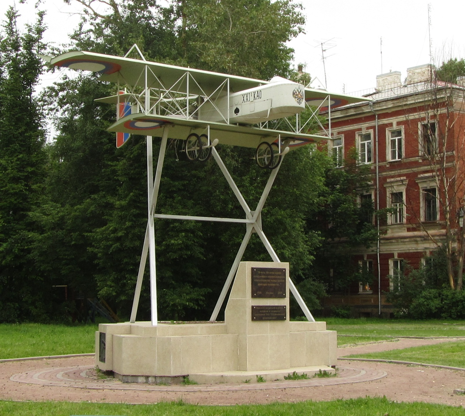 Памятник 100-летию Гатчинского аэродрома